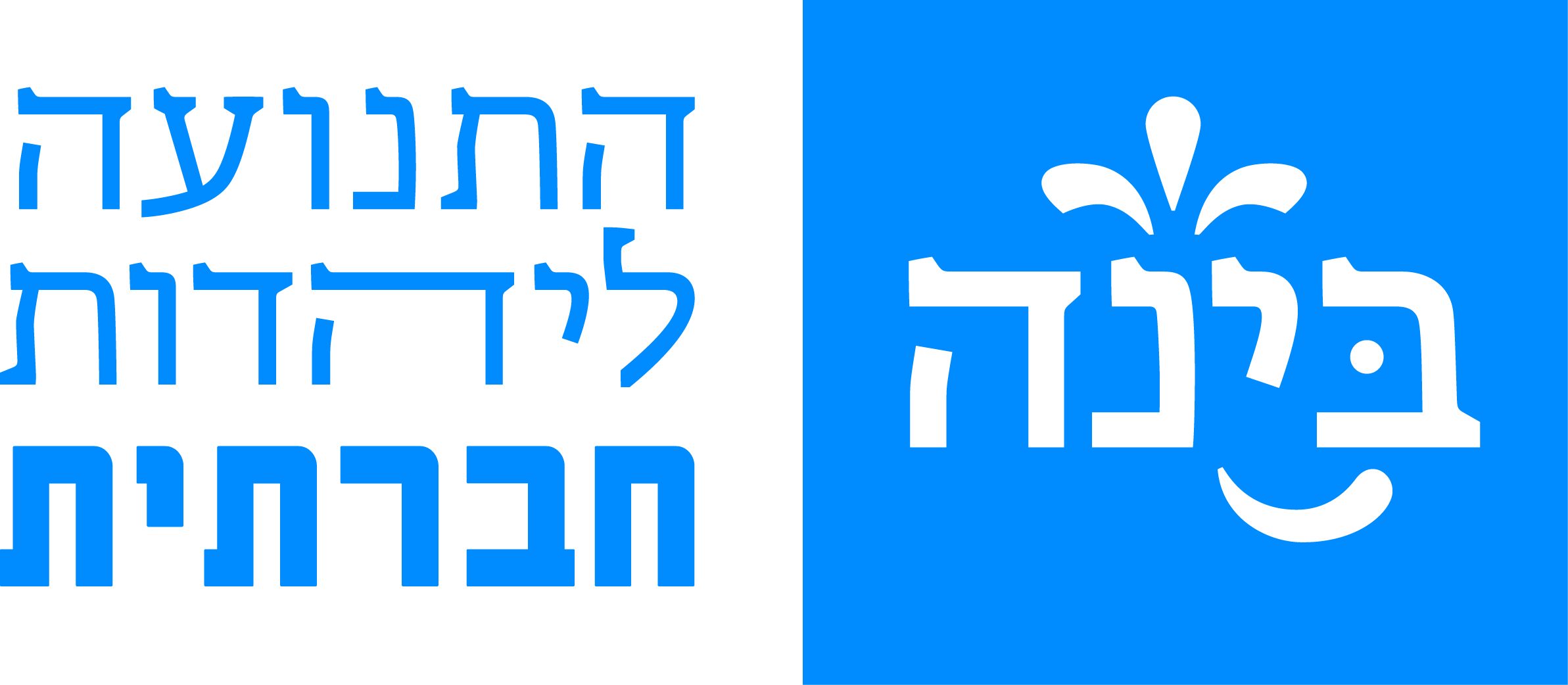 לוגו בינ״ה - התנועה ליהדות חברתית